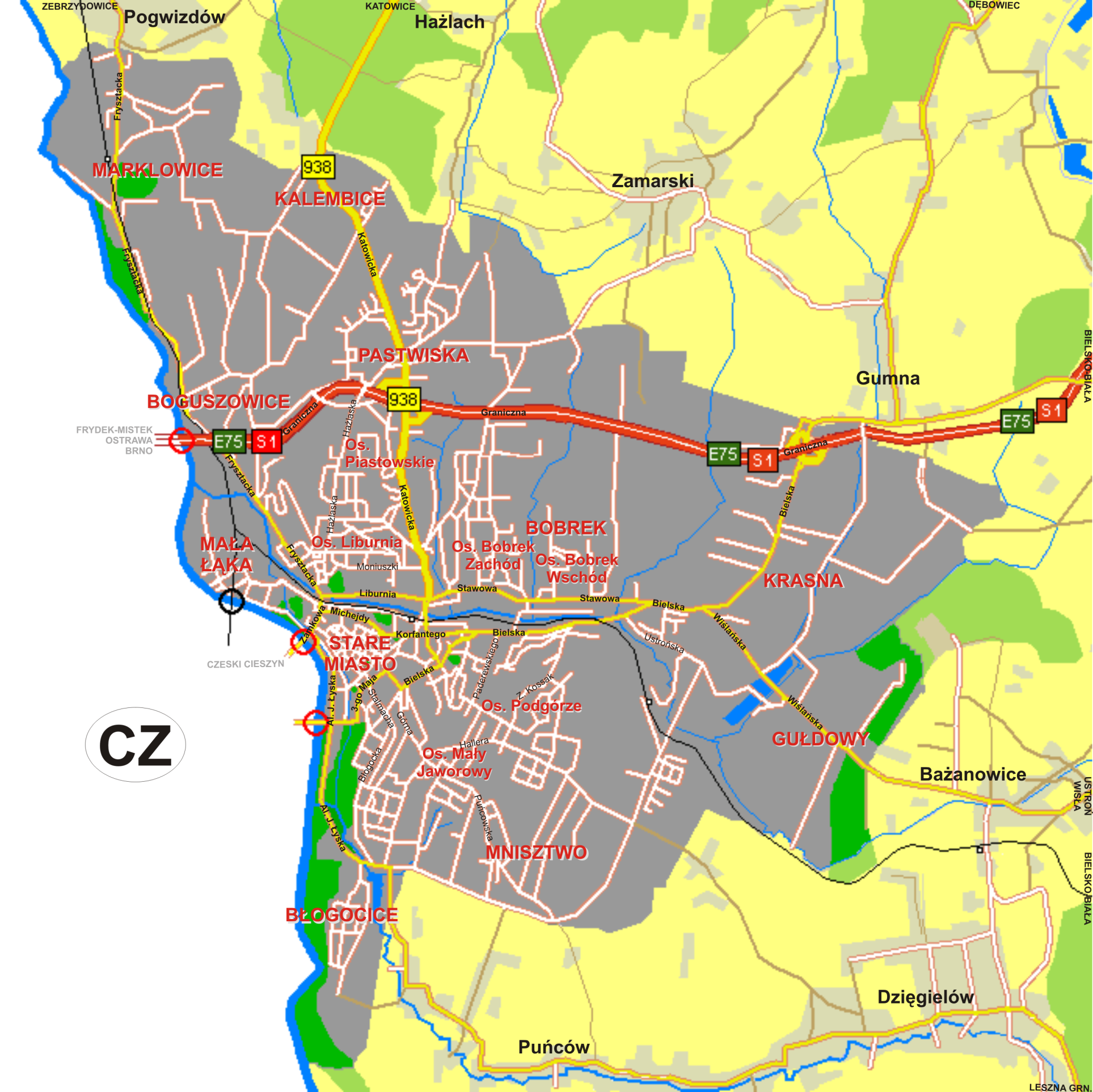 Plan ogólny miasta Cieszyna. Aktualizacja: III.2006